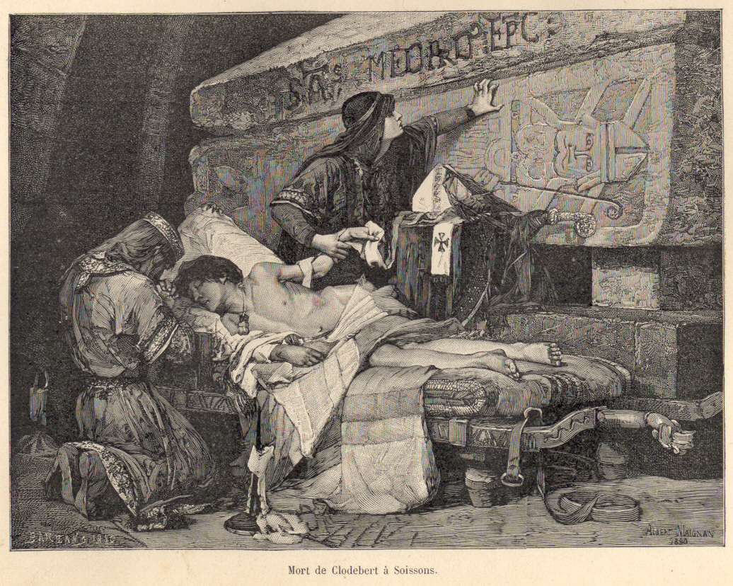 Gemälde/Stich von Albert Maignan: Mort de Clodebert à Soissons ou Derniers moments de Chlodobert.